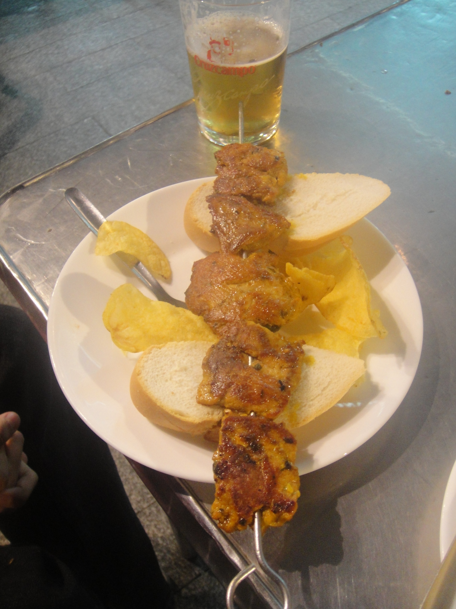 Pinchito de pollo del Bar Manolo, en la sevillana Plaza de la Alfalfa